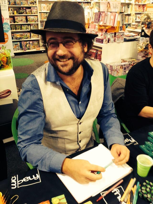 Tristan Pichard en dédicace (2014)